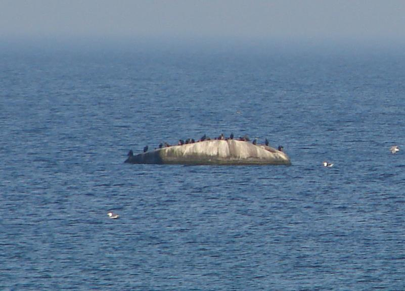 Der Buskam vom Ufer aus